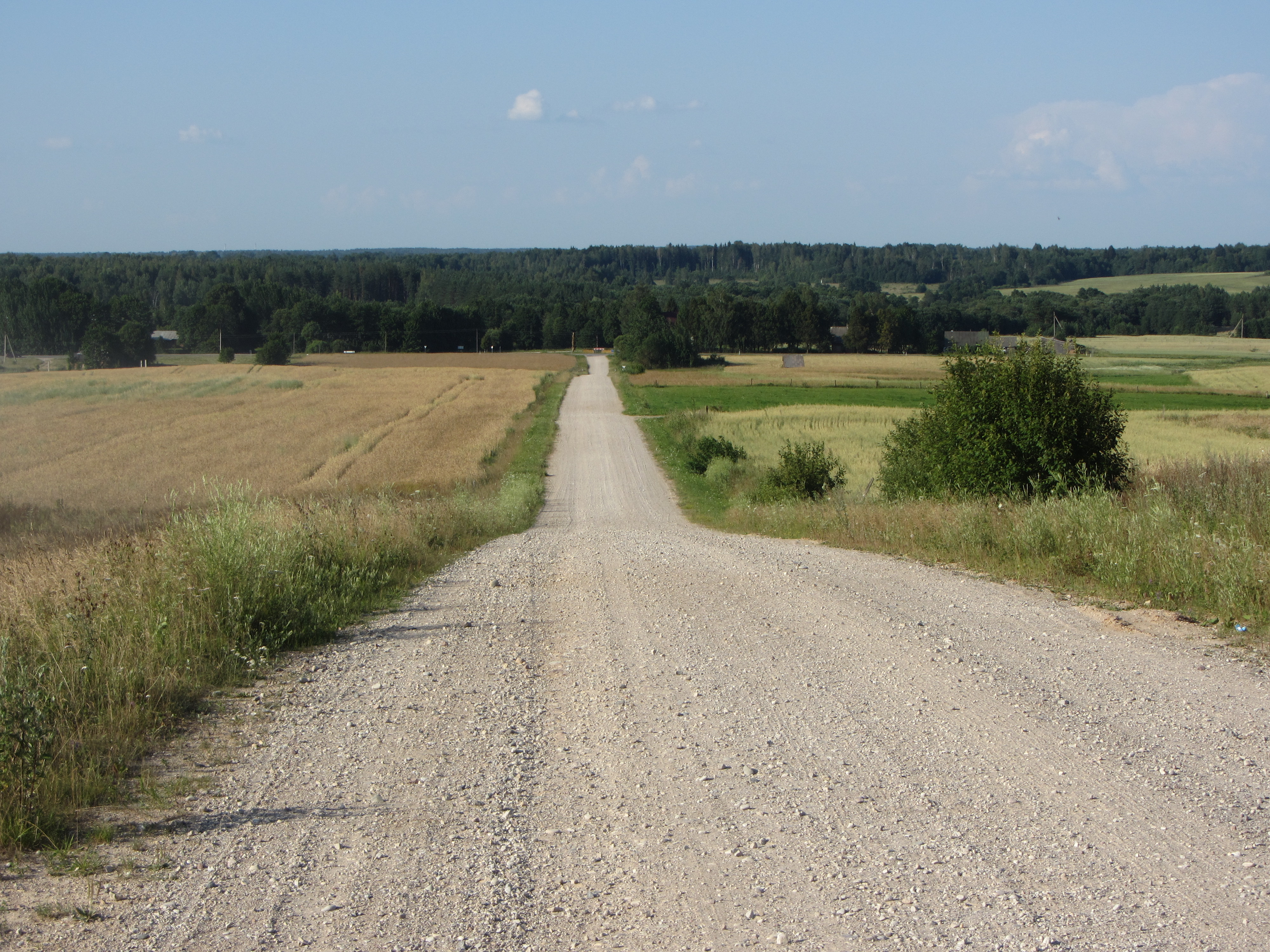 Naujojo Daugėliškio sen., Lithuania